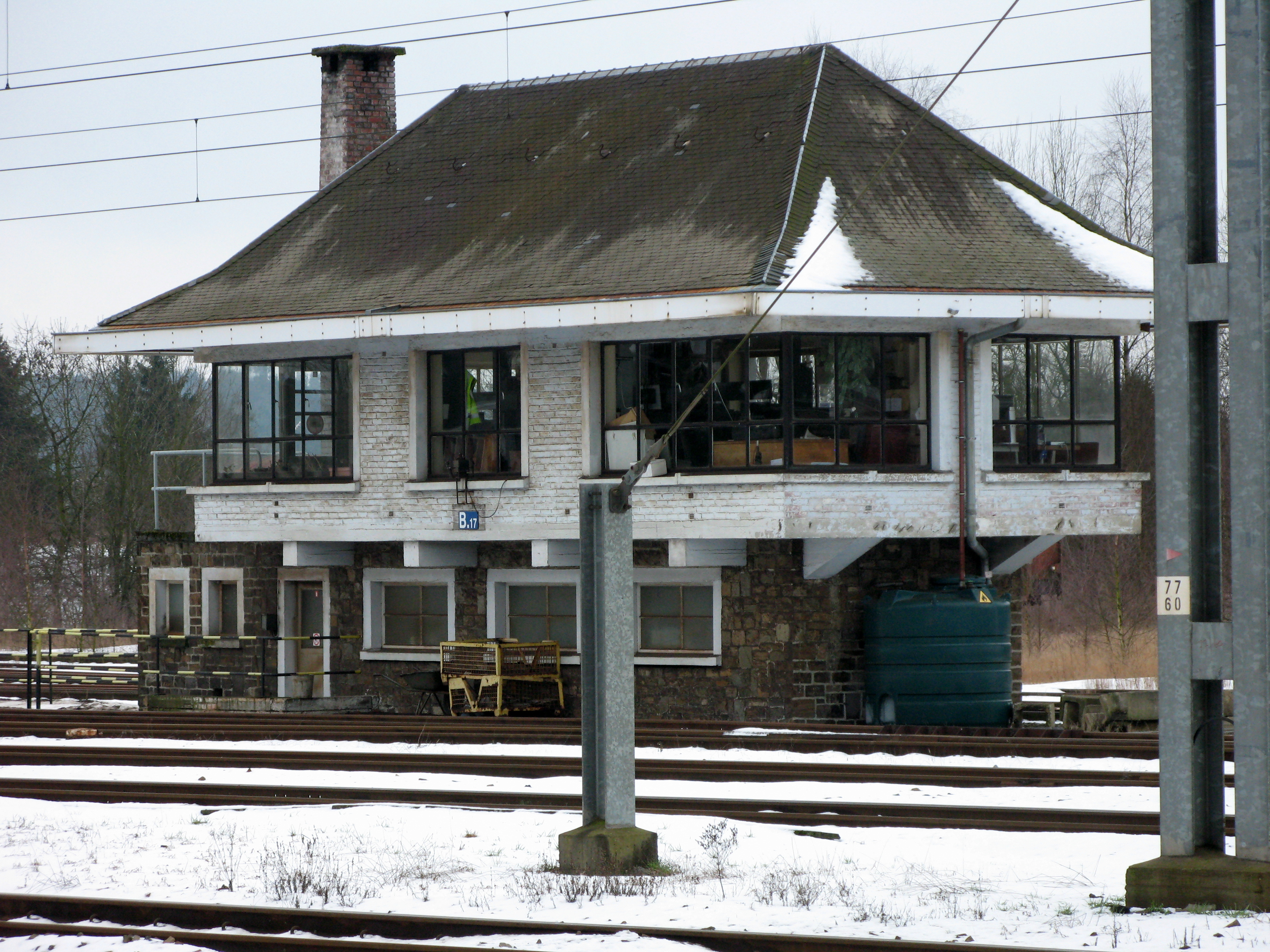 Stellwierk an der Gare vu Gouvy